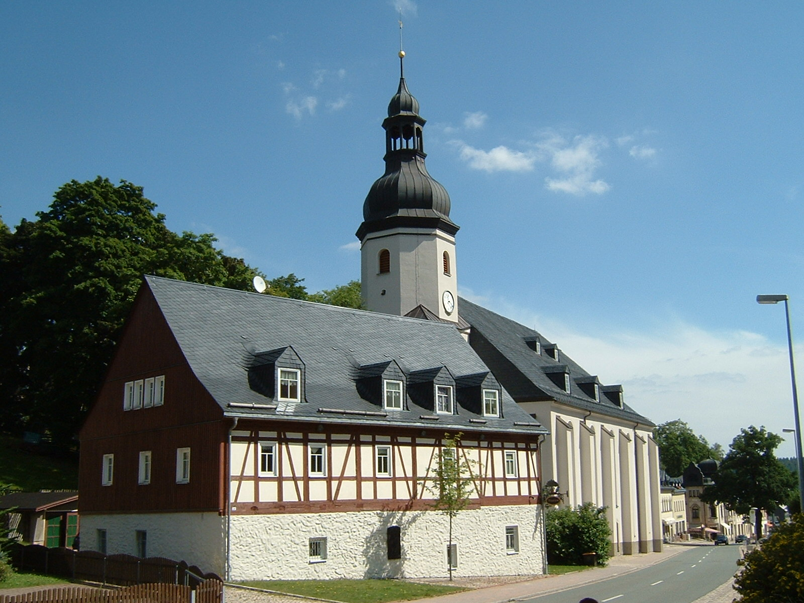 Schönheide im Erzgebirge in Sachsen, Germany - Kirche von 1773 und Bürstenmuseum